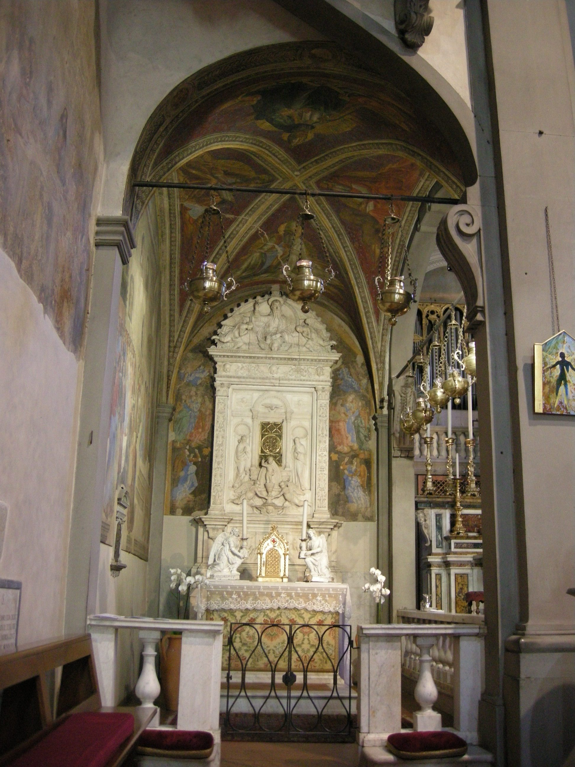 Cappella del miracolo del sacramento